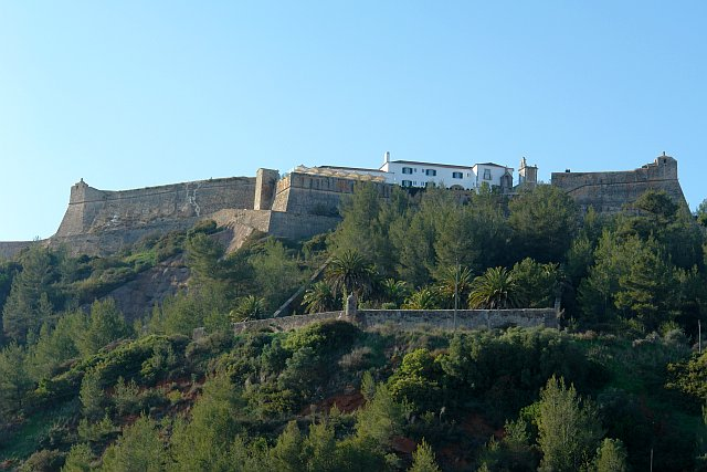 Castelo de S. Filipe, Setúbal, Portugal. Photographer: Osvaldo Gago